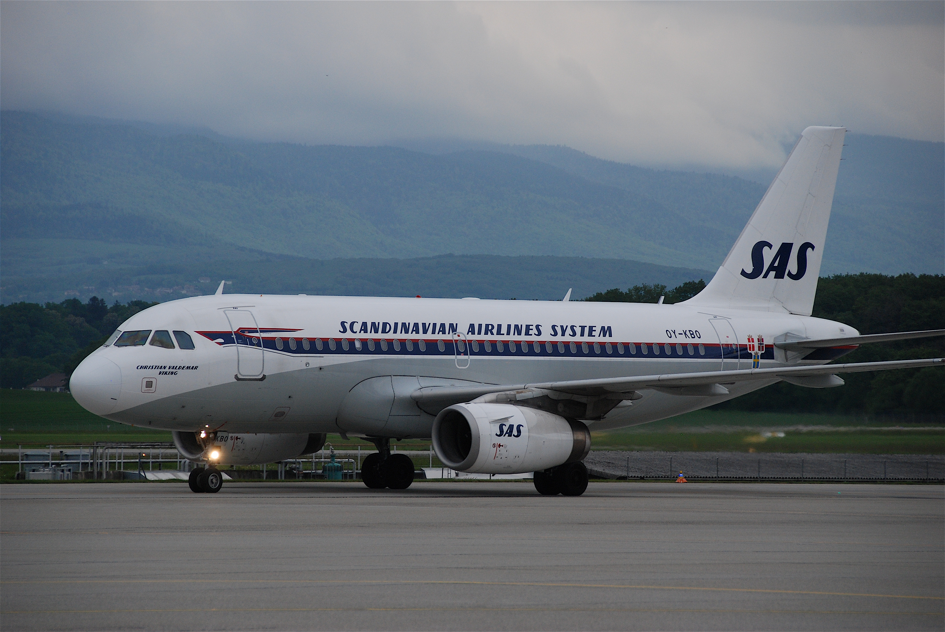 SAS RetroJet